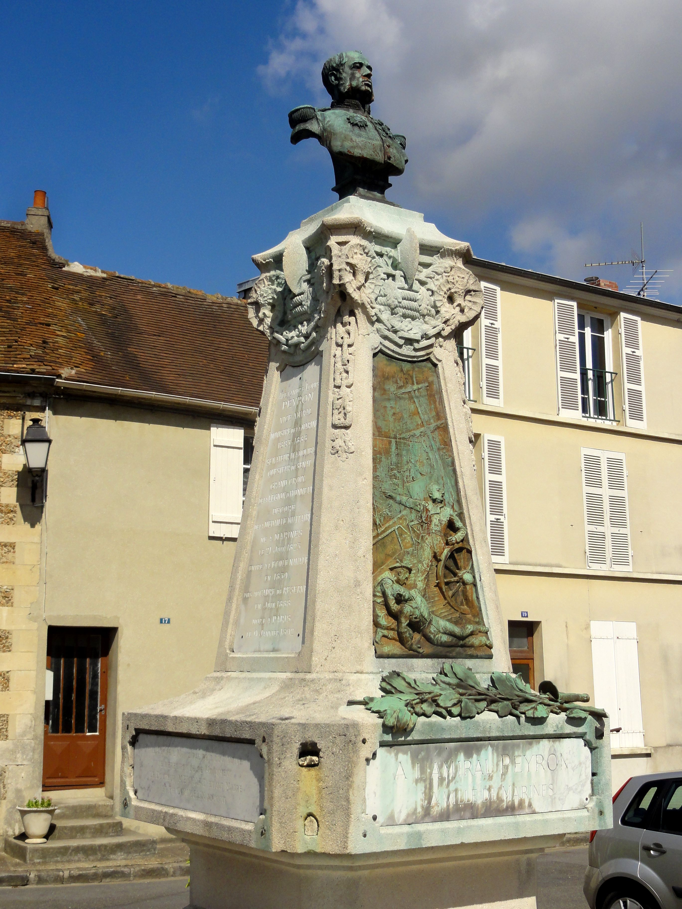 Monument pour l'amiral Ernest Peyron, place du maréchal Leclerc.